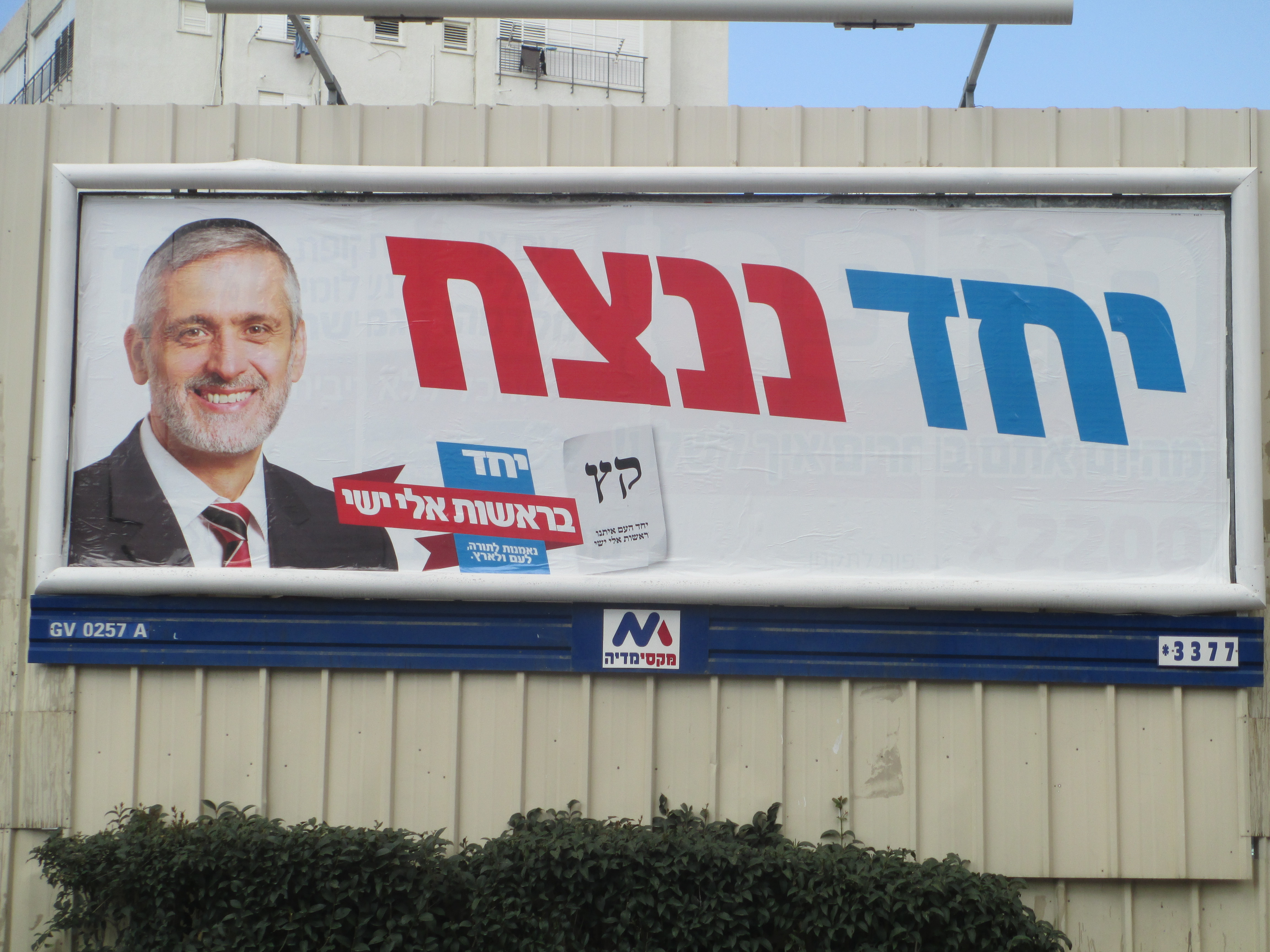 כרזת בחירות של אלי ישי,יחד, בחירות 2015